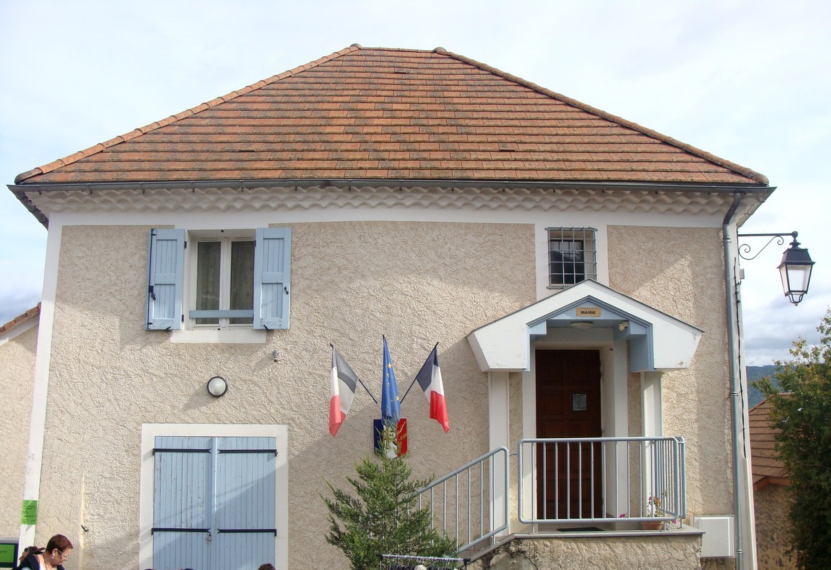 La mairie de Fouillouse (Hautes-Alpes).